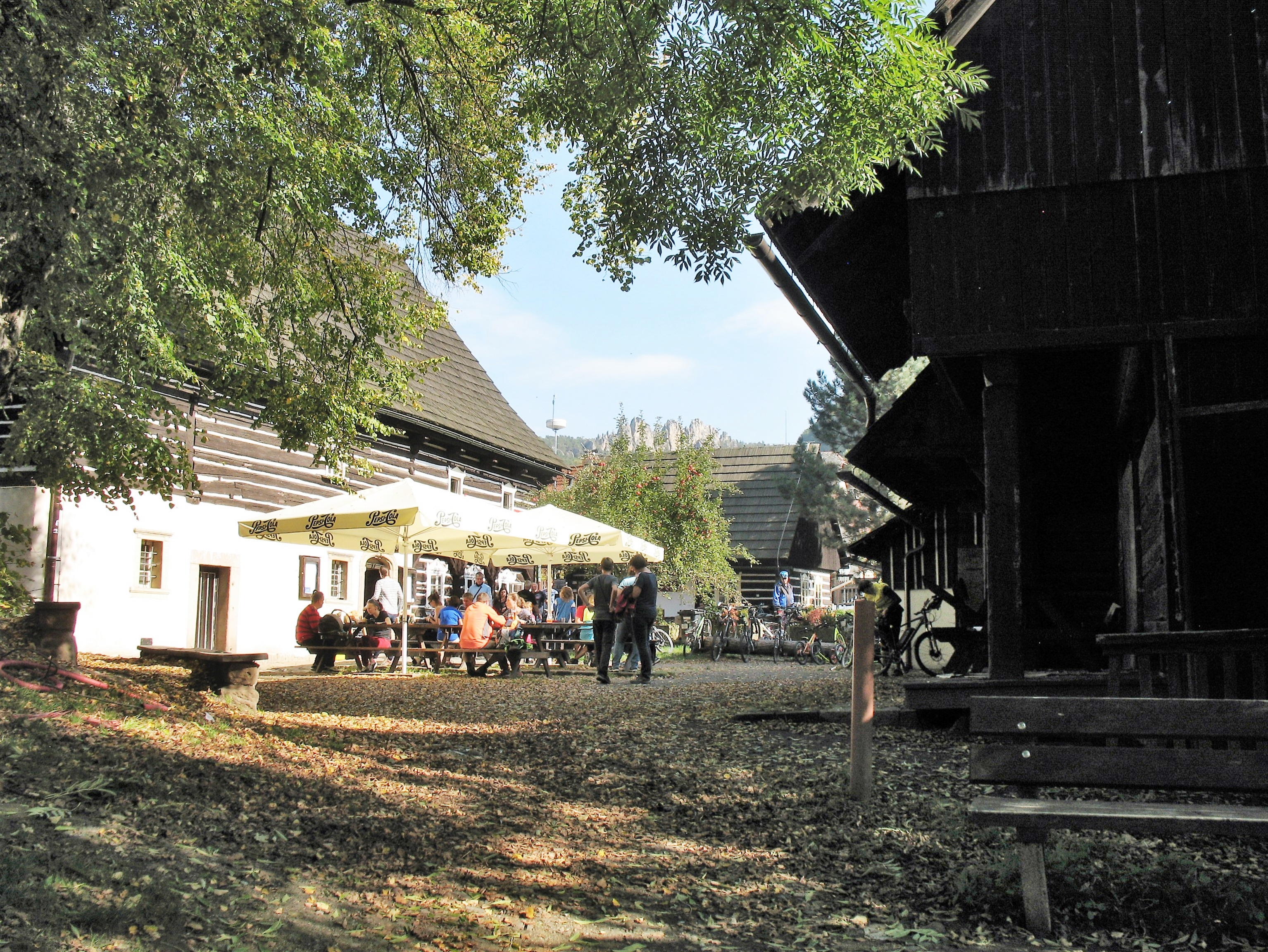 Boučkův statek ve Vranovém (Malá Skála. Liberecký kraj). Na dvoře Boučkova statku